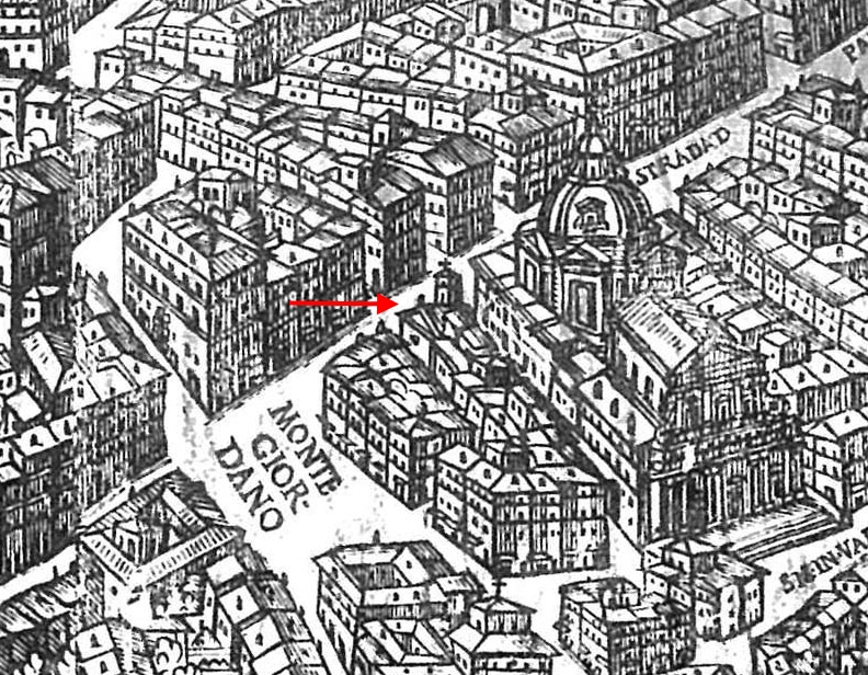 Pianta di Maggi